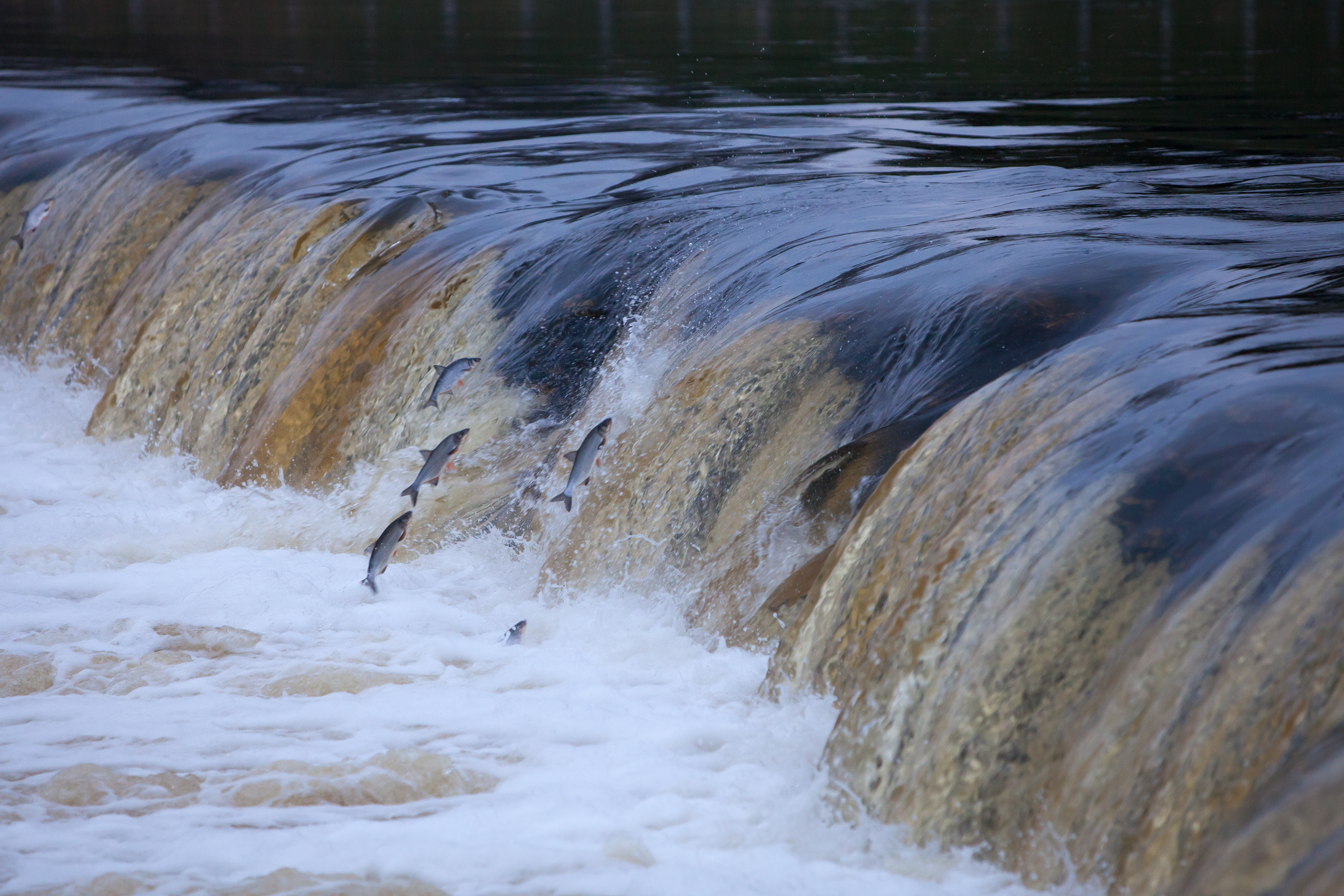 Vimbu lekšana Ventas rumbā